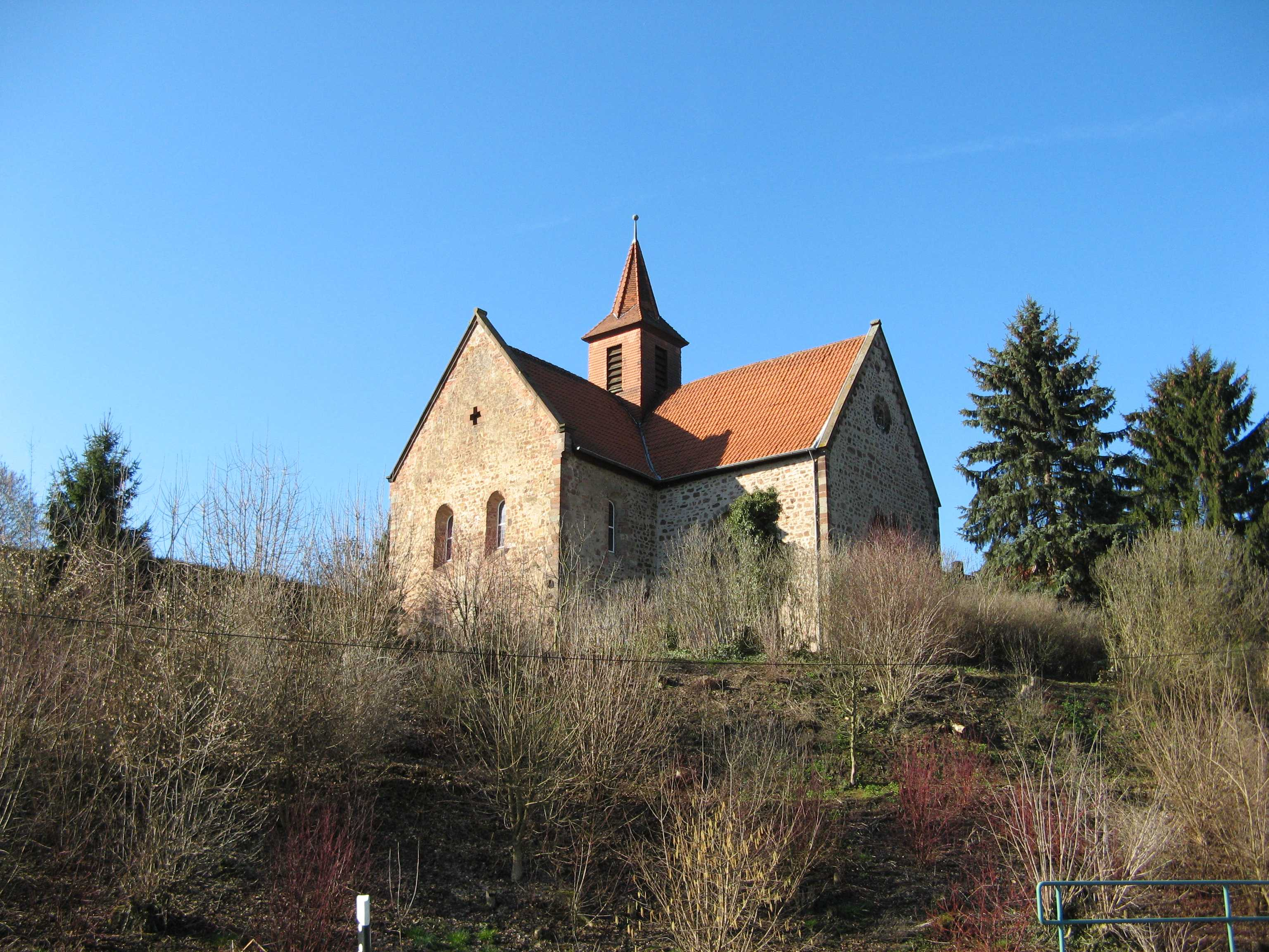 Kirche von Blankenheim (Bebra); ehemalige Klosterkirche (Chor und Querhaus) des Augustinerinnenklosters Blankenheim